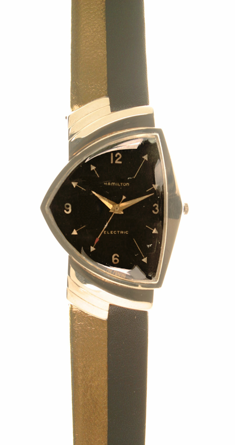 Erste elektrische Armbanduhr Pacer, Hamilton, USA, ab 1957 (Deutsches Uhrenmuseum, Inv. 2005-097)